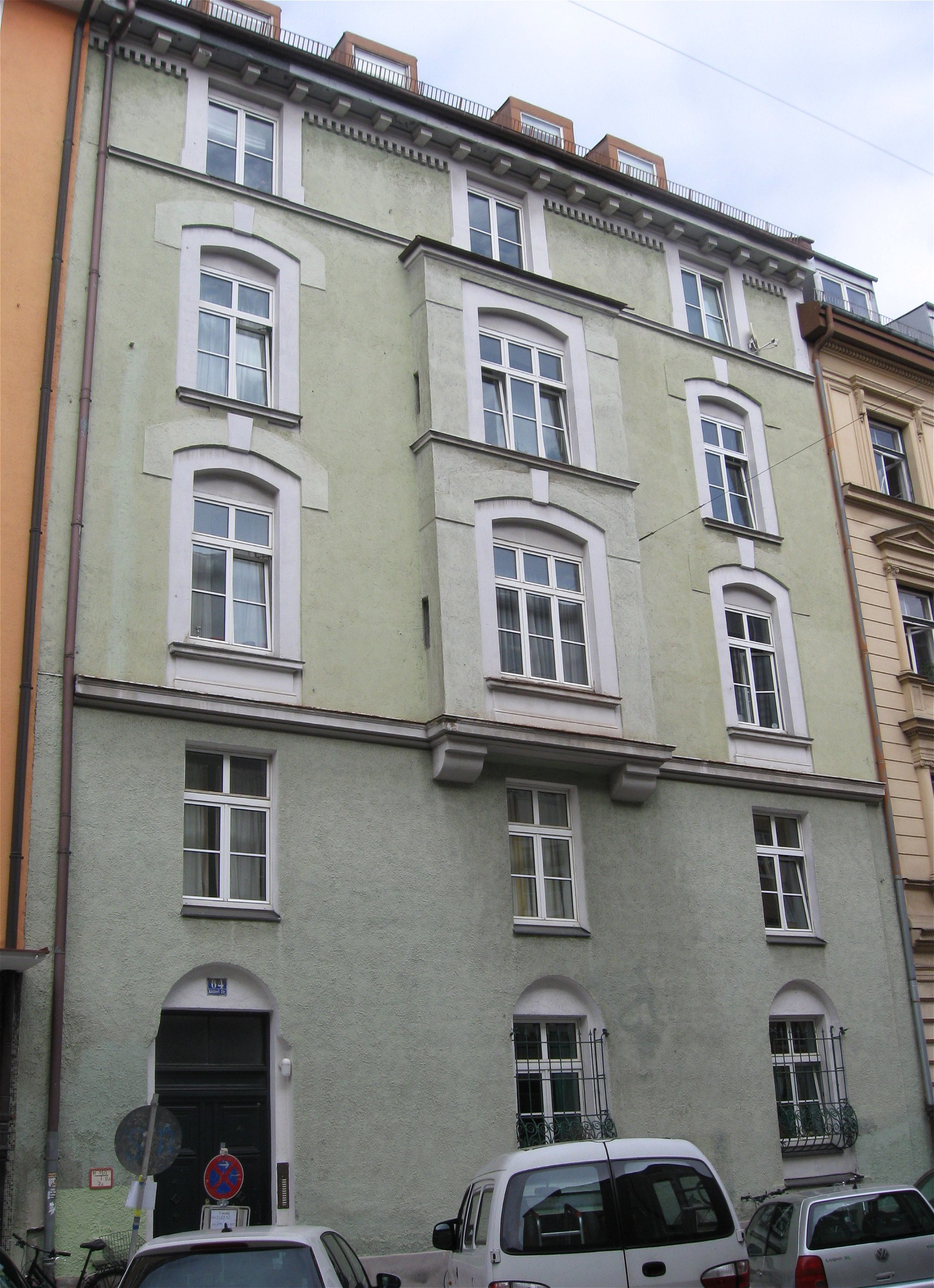 Adalbertstraße 64; Mietshaus, Neurenaissance, mit Flacherker, um 1899; vereinfacht; vgl. Nr. 49 und 51.